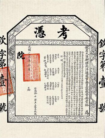 中国近代第一张大学毕业证书，北洋大学颁发予王宠惠的钦字第一号考凭